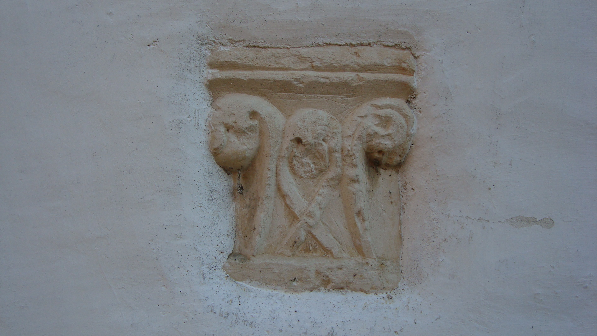 opeka iz ruševin gradu na cerkvi